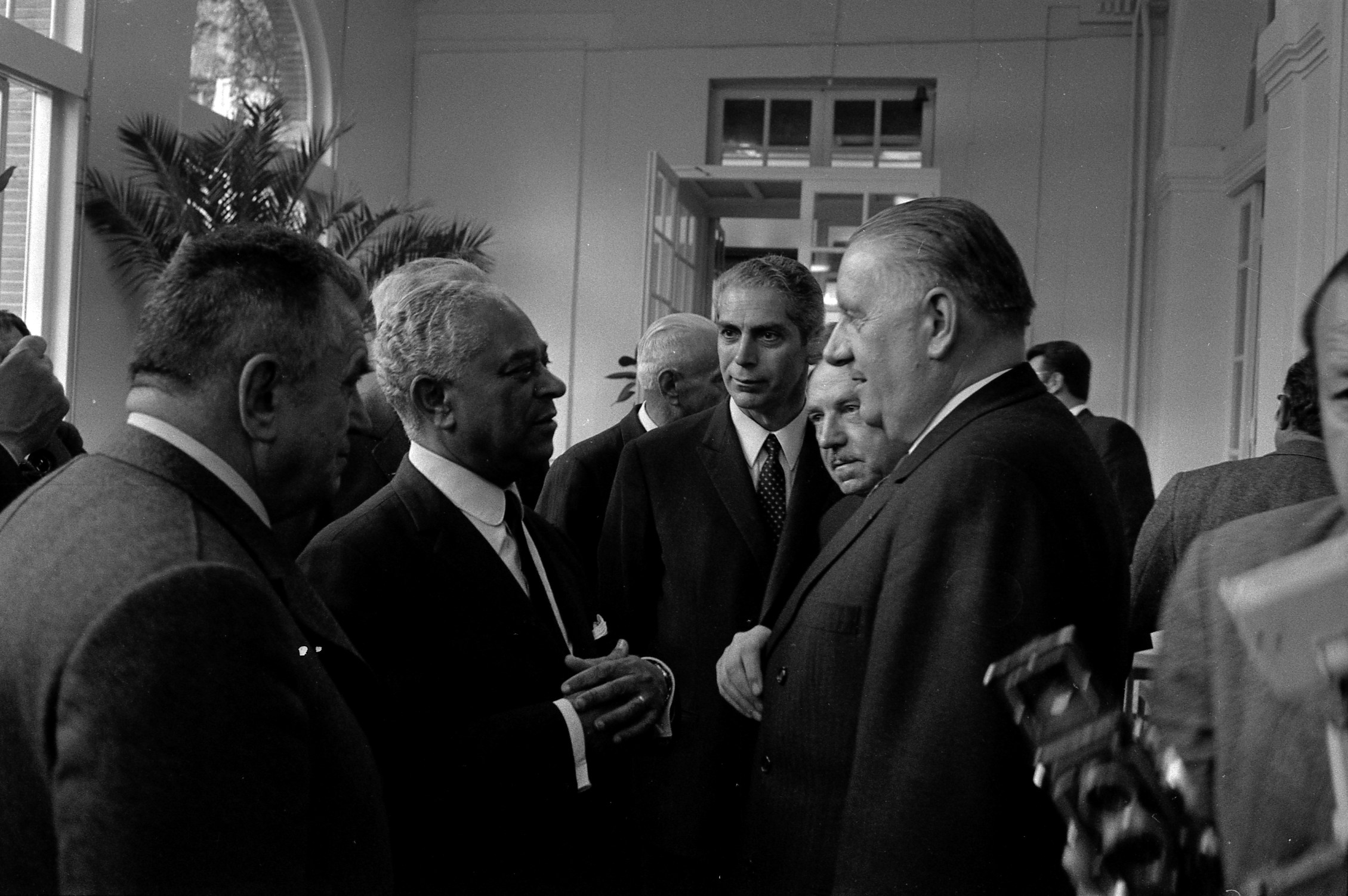 Pas de lieu. Le 23 Avril 1969. Vue de messieurs Poher, Monnerville et Eckoute en pleine discussion en réunion.